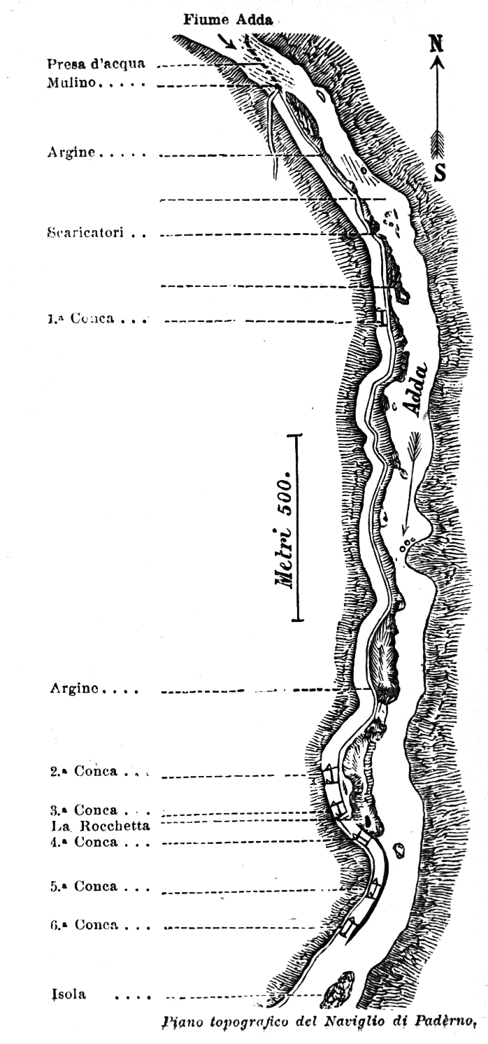 Naviglio di Paderno, canal designed by Leonardo da Vinci